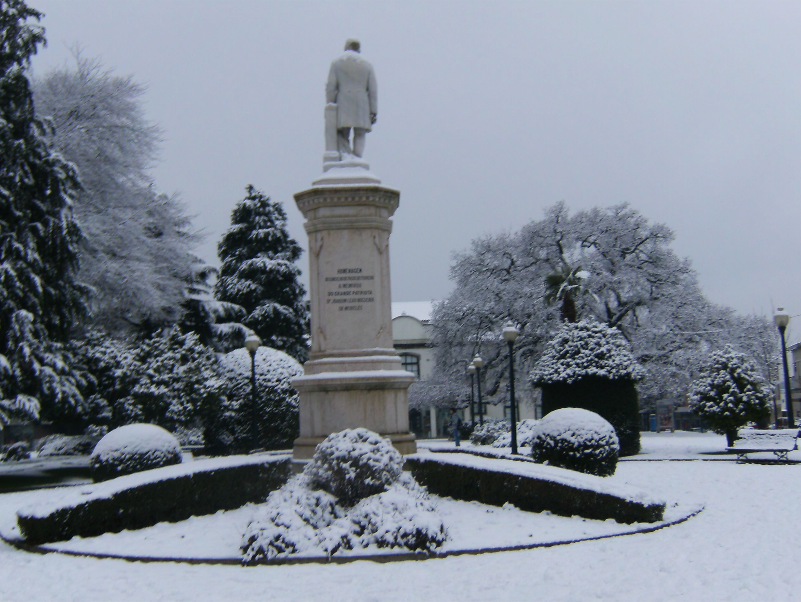 Jardim Municipal de Paços de Ferreira durante o nevão de 9 de Janeiro de 2009